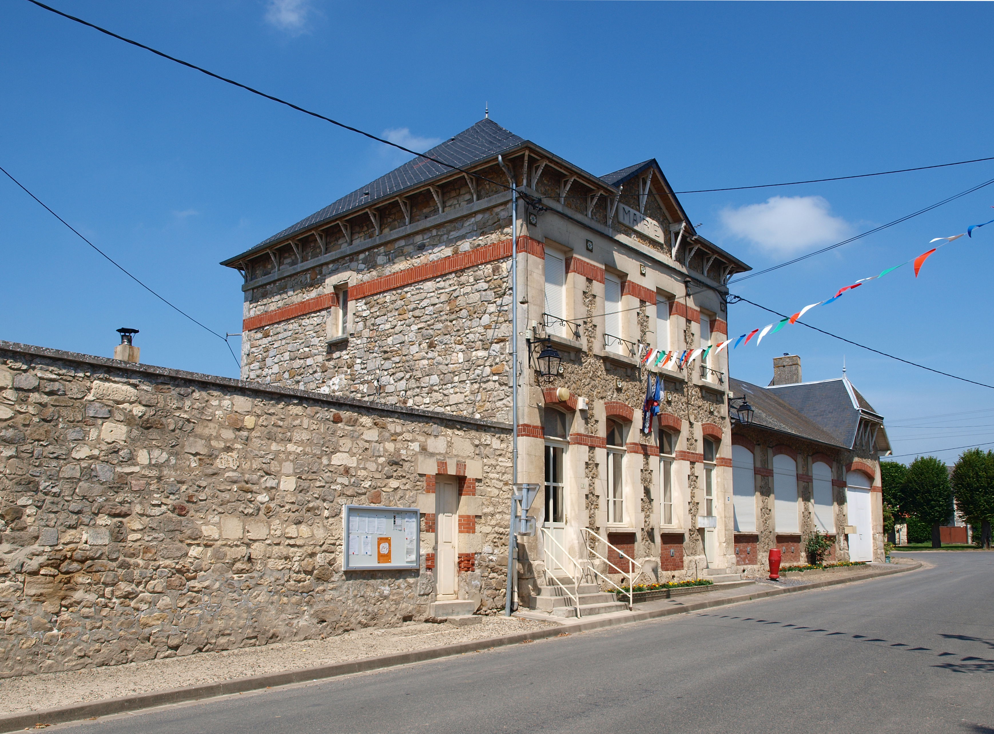 Grand-Rozoy (Aisne, France) ; mairie